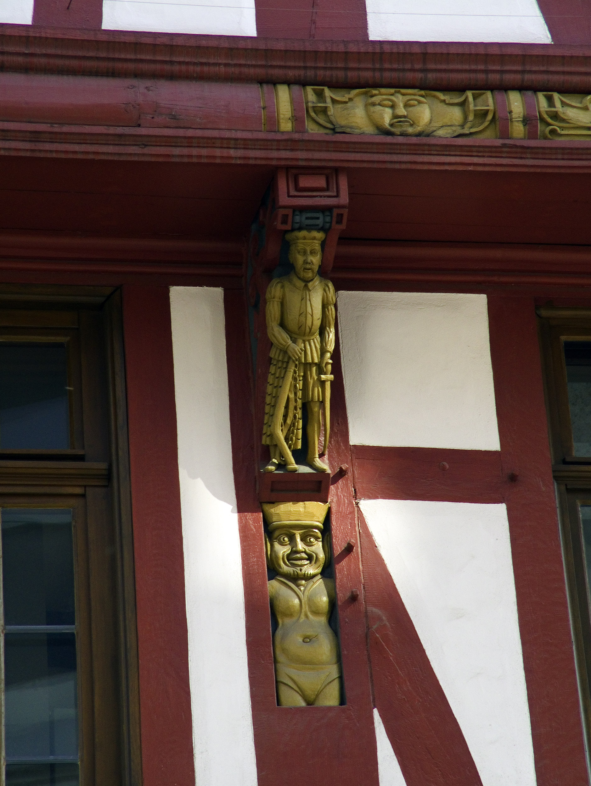 Östliche Knagge unter dem zweiten Obergeschoss der zum Markt gewandten Seite des Großen Engels in der Altstadt von Frankfurt am Main. Selber fotografiert im Mai 2006, daher gemeinfrei.